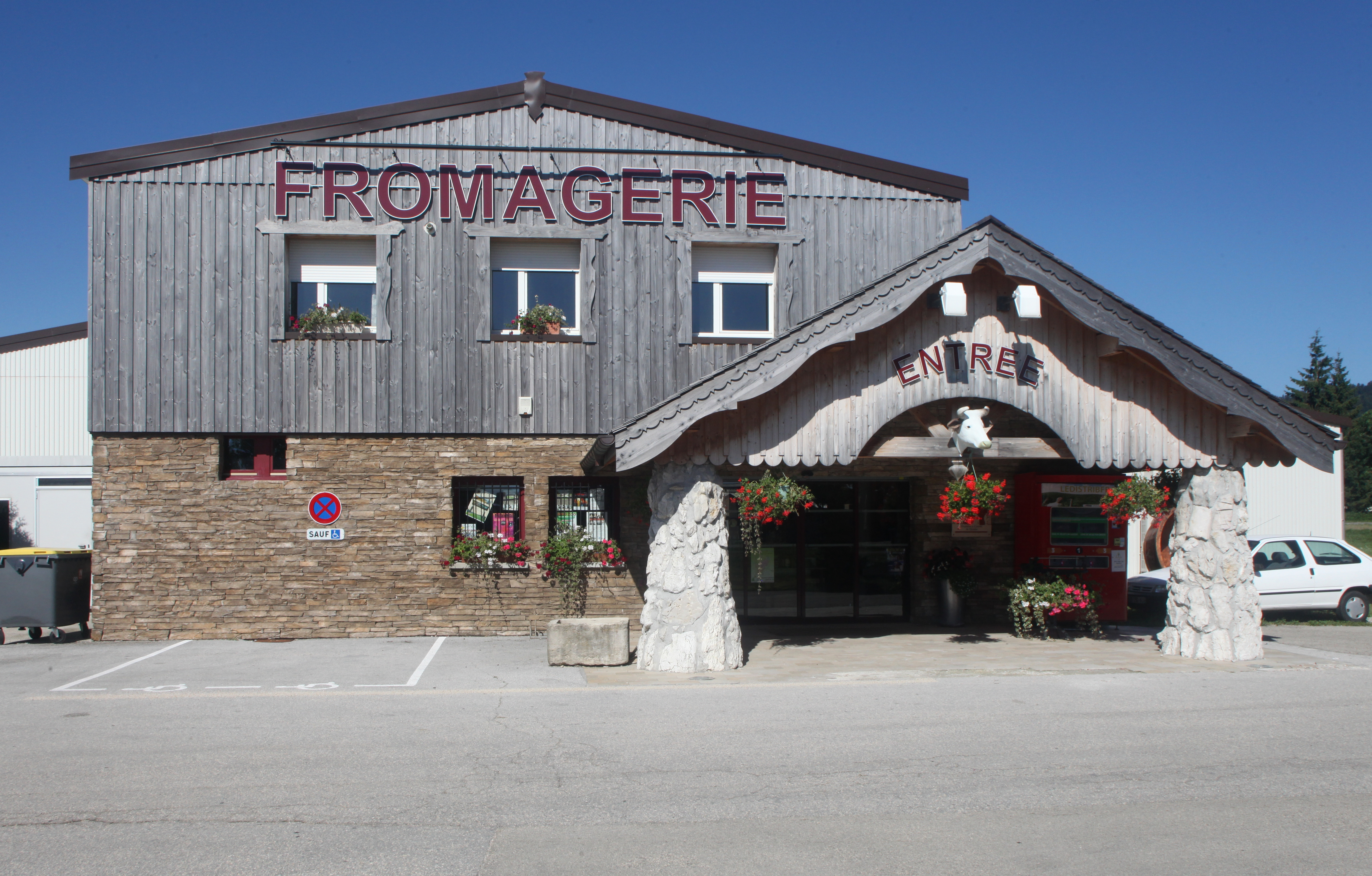 Fruitière de Doubs (25).